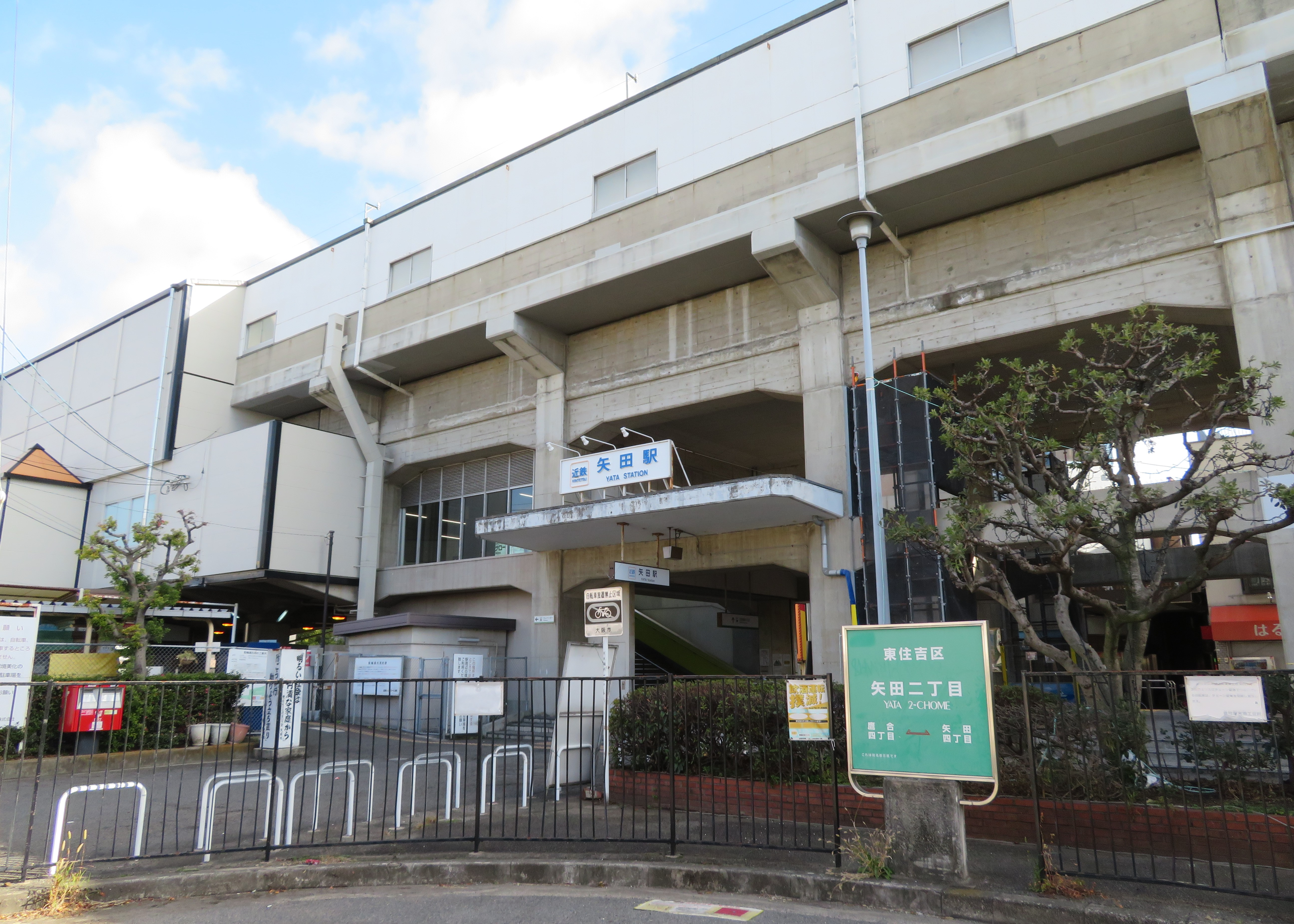 近鉄矢田駅